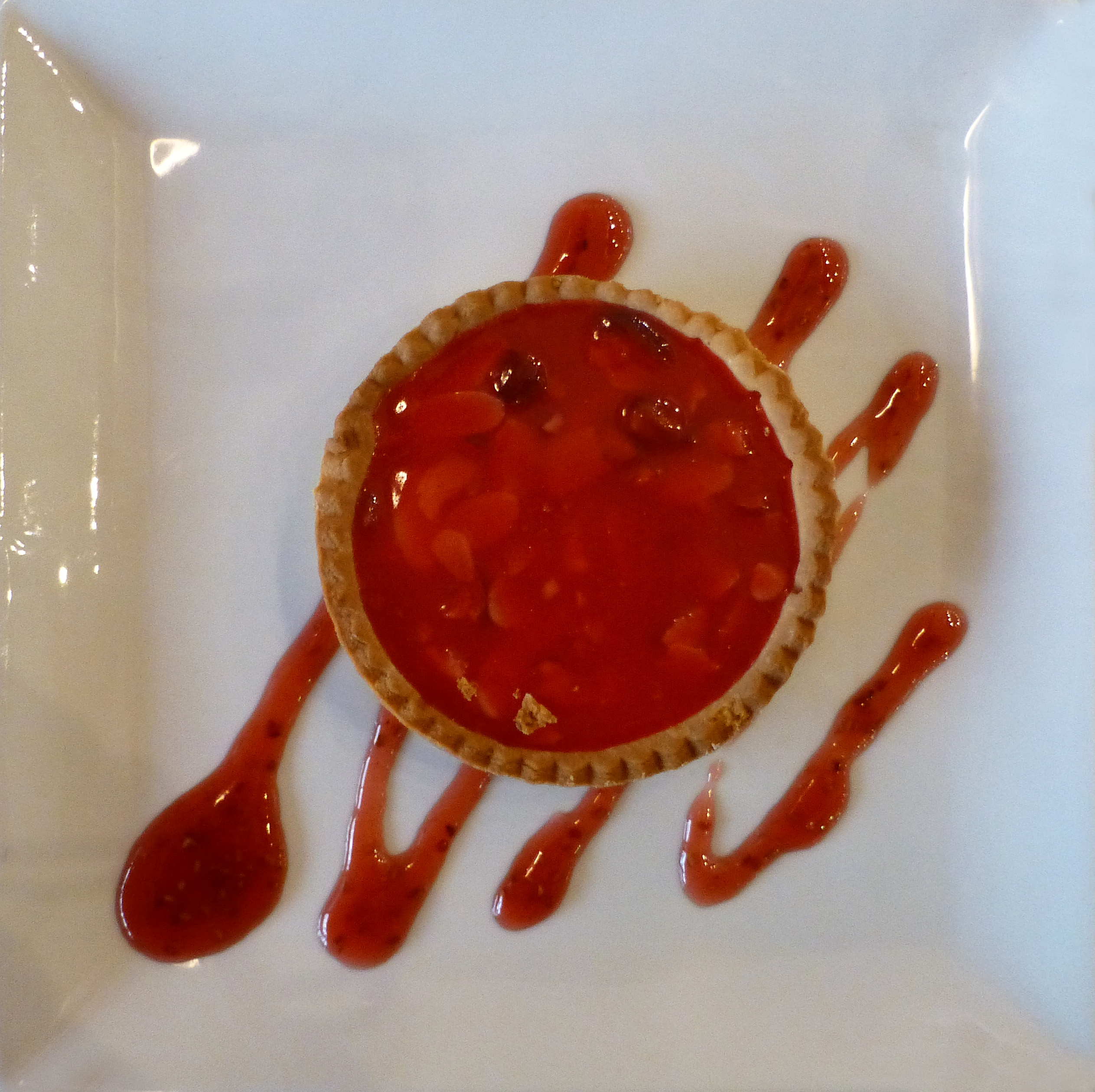 Tartelette aux pralines roses (Lyon).